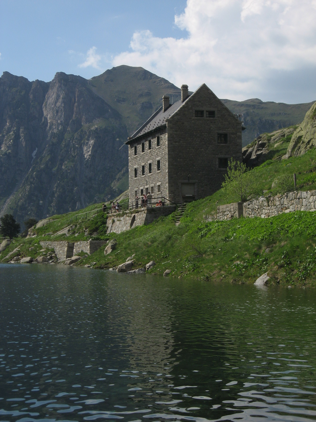 Refugi de la Restanca